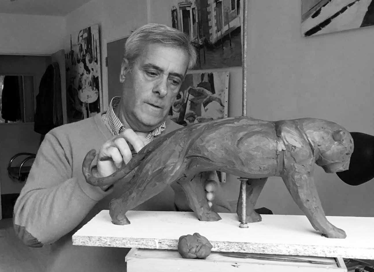 Photo fournie par moi même. Jorge Borrás travaillant sur une oeuvre.